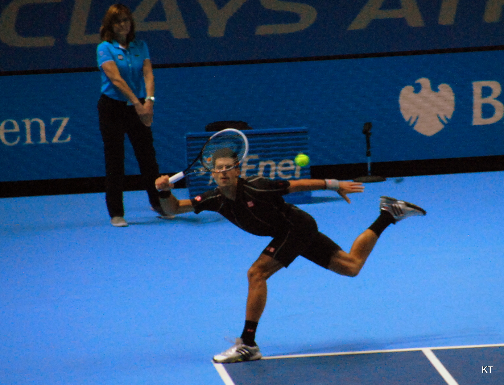 Novak Djokovic